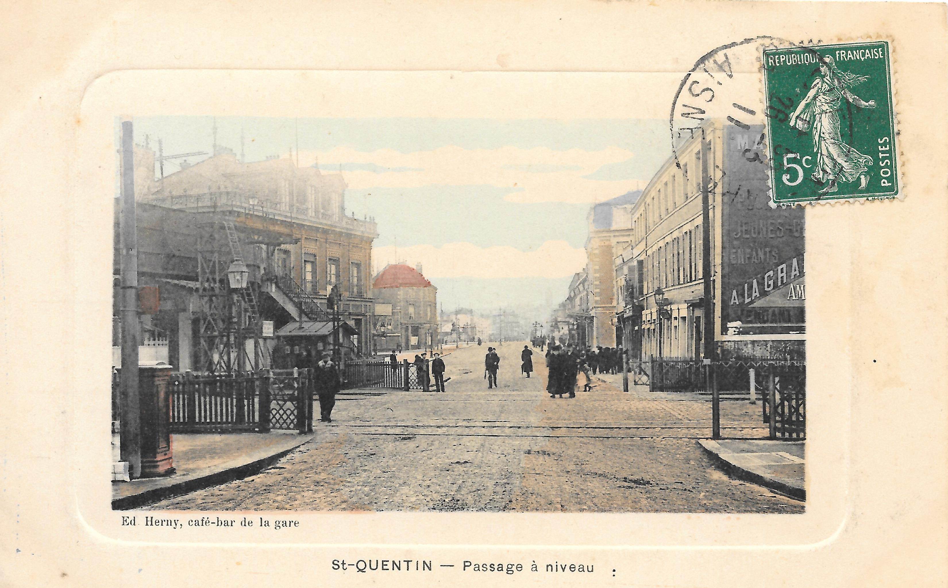 La gare de Rocourt.